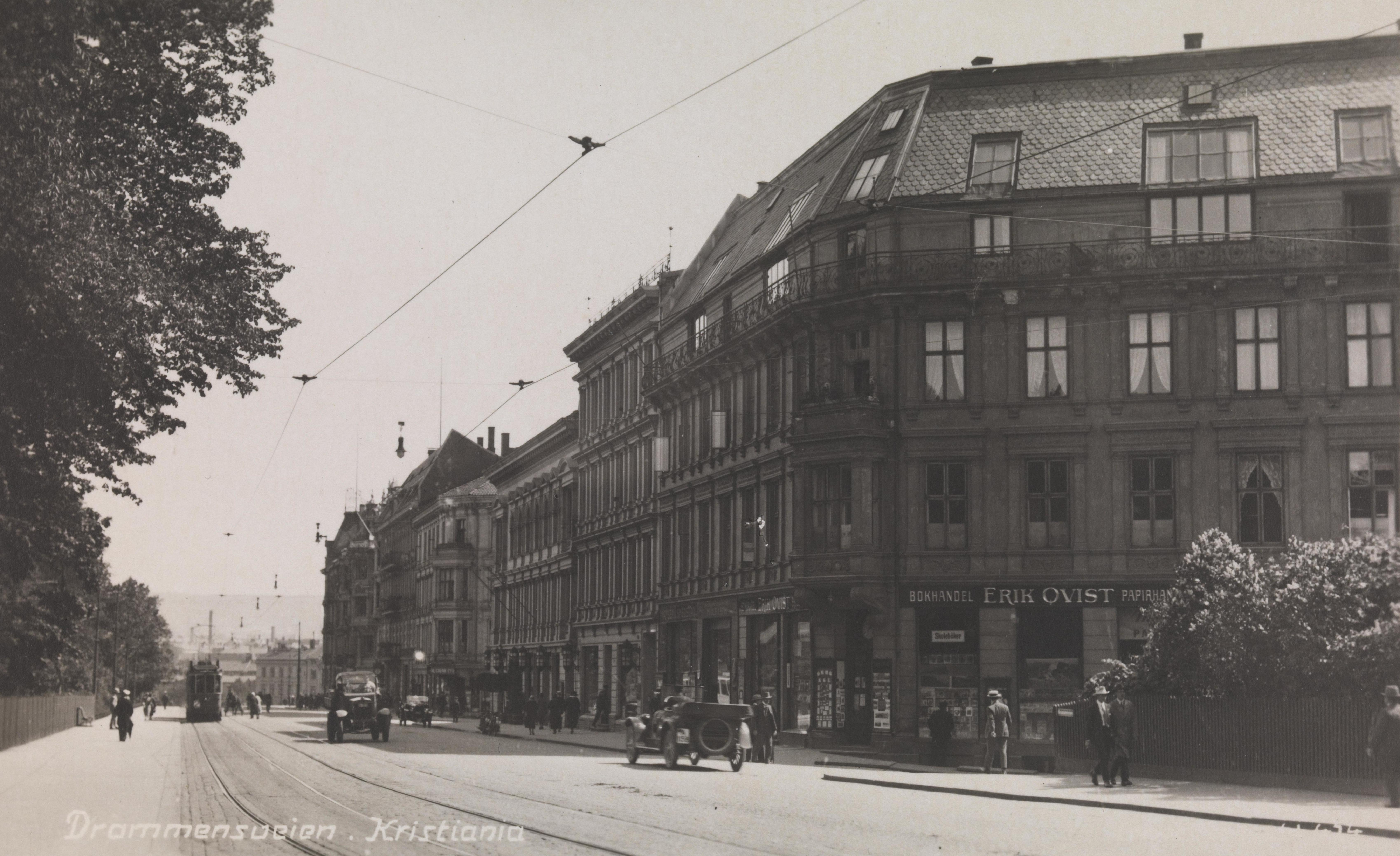 Bildet er hentet fra Nasjonalbibliotekets bildesamling Drammensveien,Frogner, Oslo, Oslo